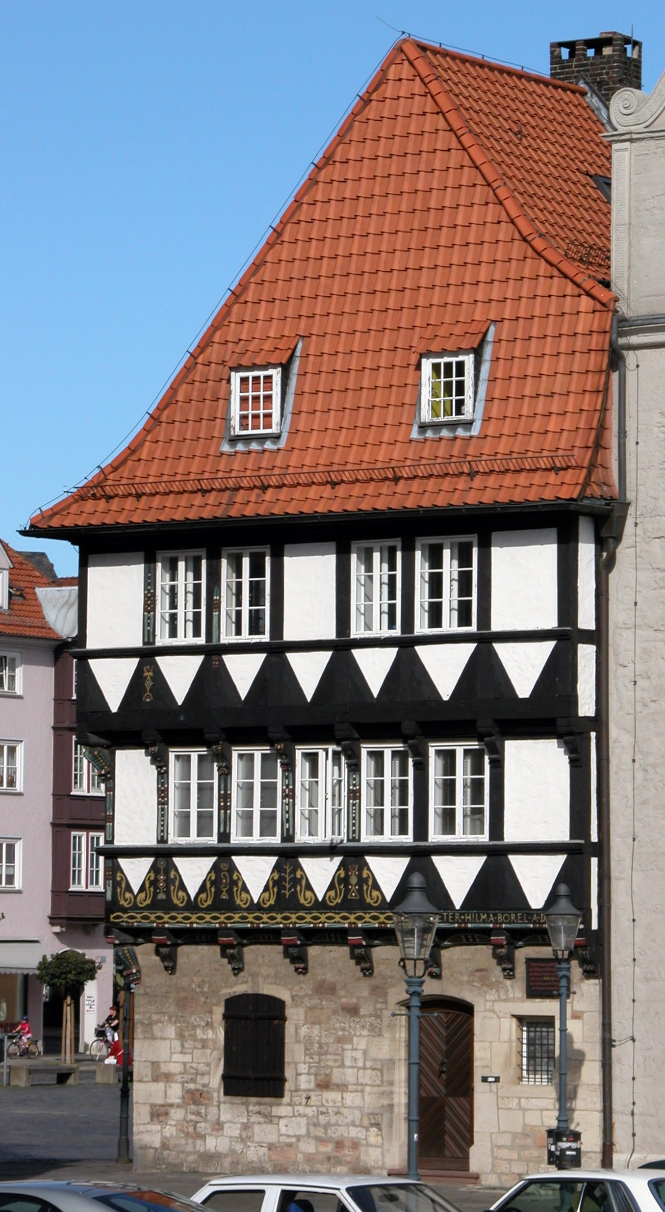 Braunschweig: Westseite des ehemaligen Rüninger Zollhauses.